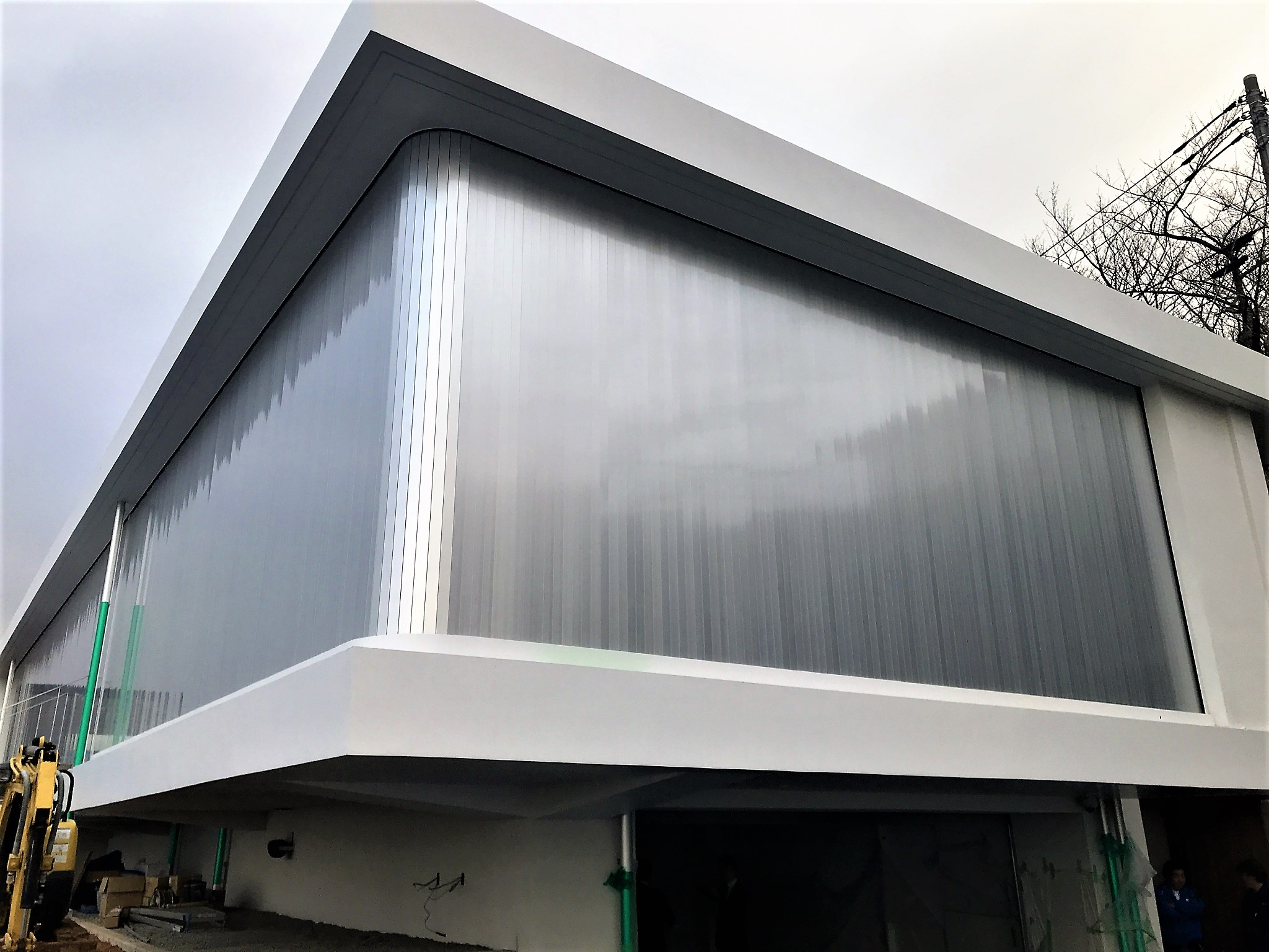 株式会社横引シャッター製品 真鶴別荘